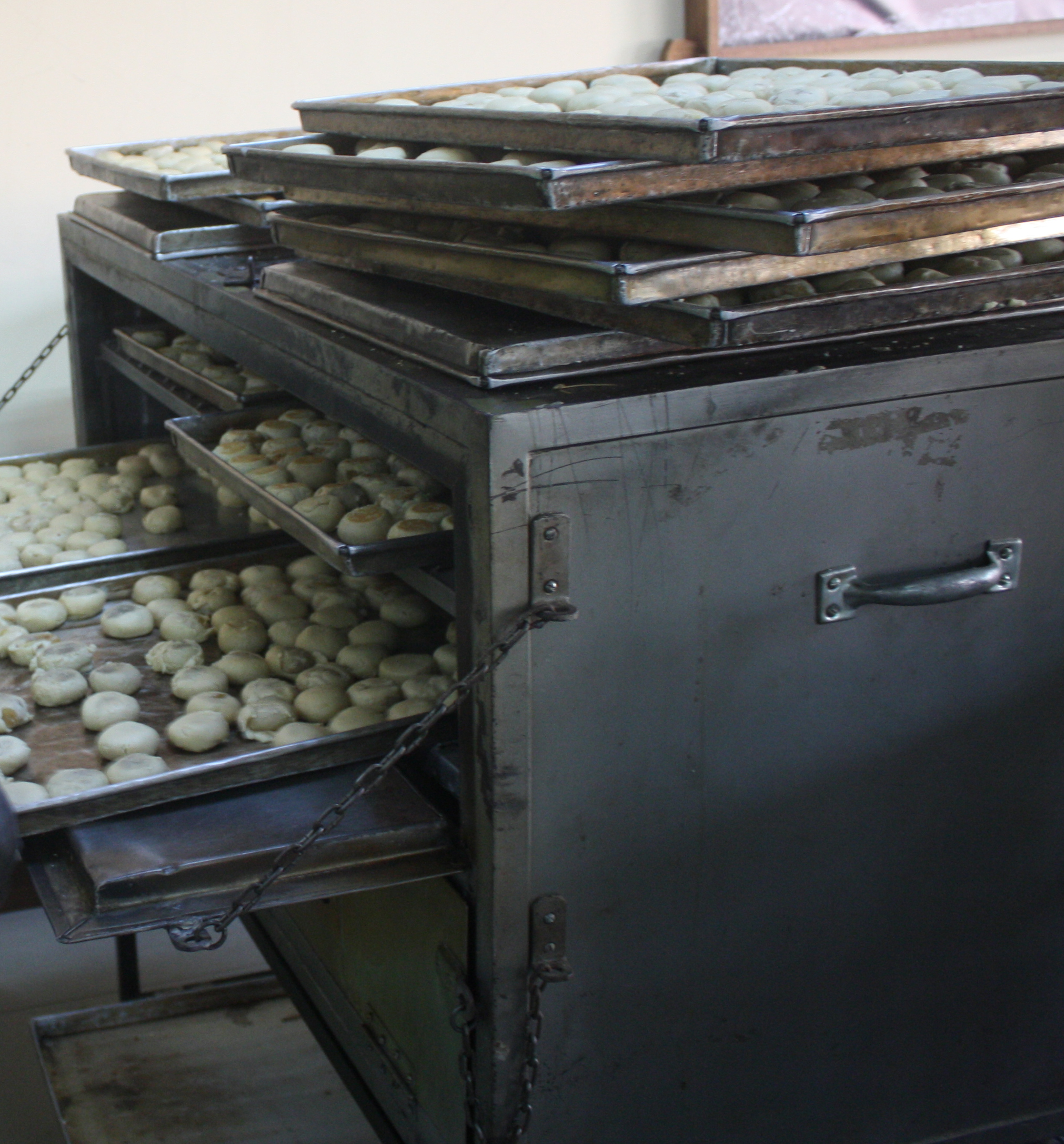 Open yang dipakai untuk memasak bakpia